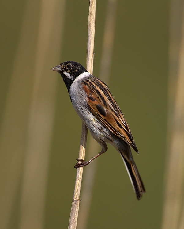 Emberiza schoeniclus, Tovačov, Chomoutov, CZ